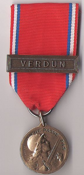 Médaille de Verdun (recto)